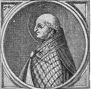 Papa Gregorio II